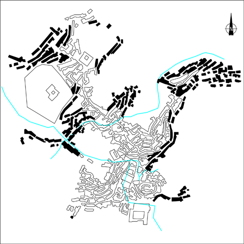 San Giovanni in Fiore - sviluppo centro storico Fase VI